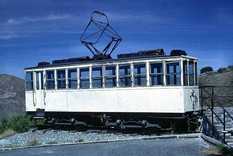 Triebwagen 3 der »Ferrocarril Elétrico de la Sierra Nevada«, hier am Nationalparkzentrum »El Dornajo«. An dieser Stelle, weit über der ehemaligen Einsatzstrecke, stand der Wagen nur vorübergehend, das Hochgebirgsklima setzte ihm sehr zu.